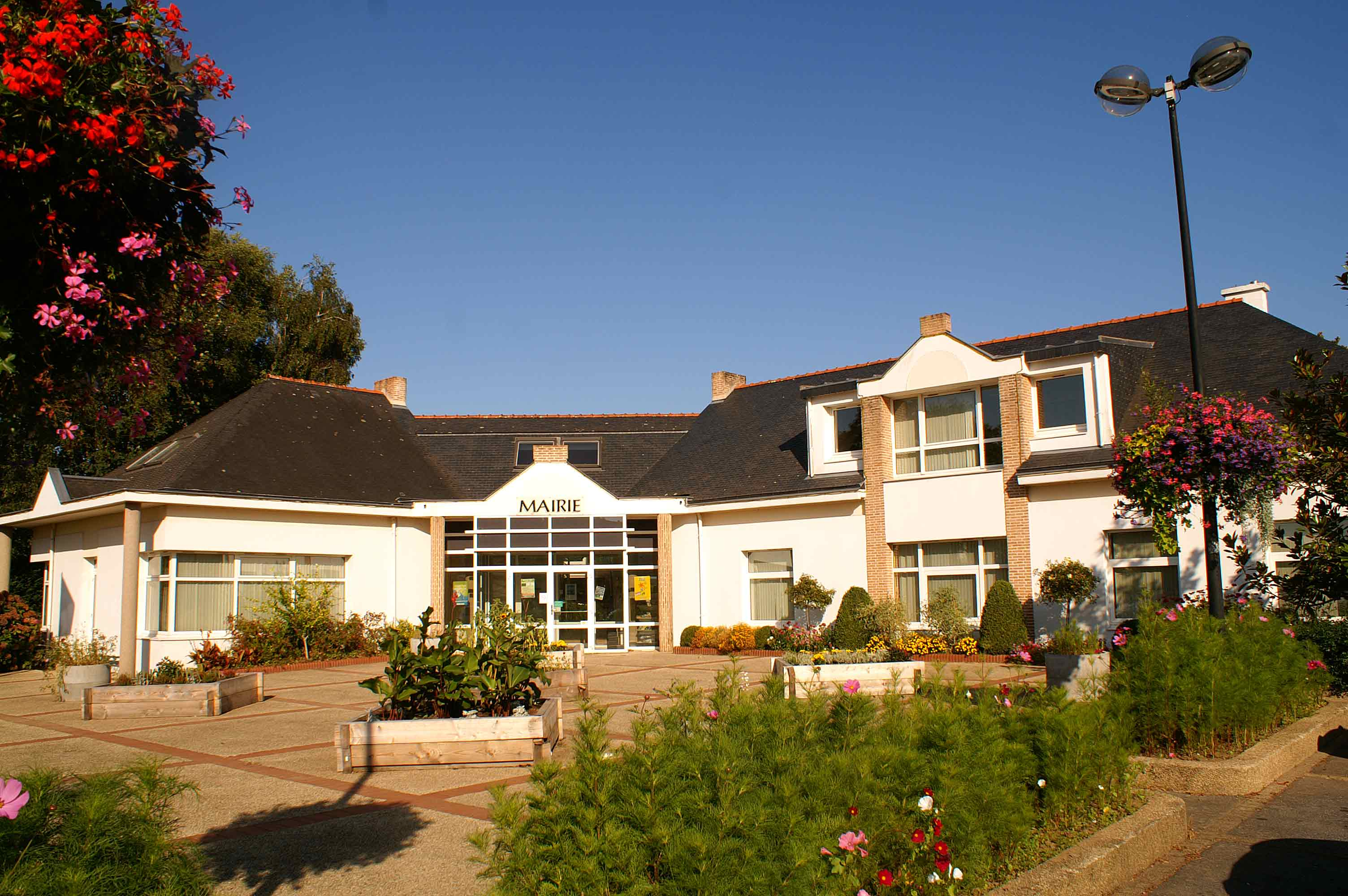 La mairie de Gestel, commune bretonne du département du Morbihan